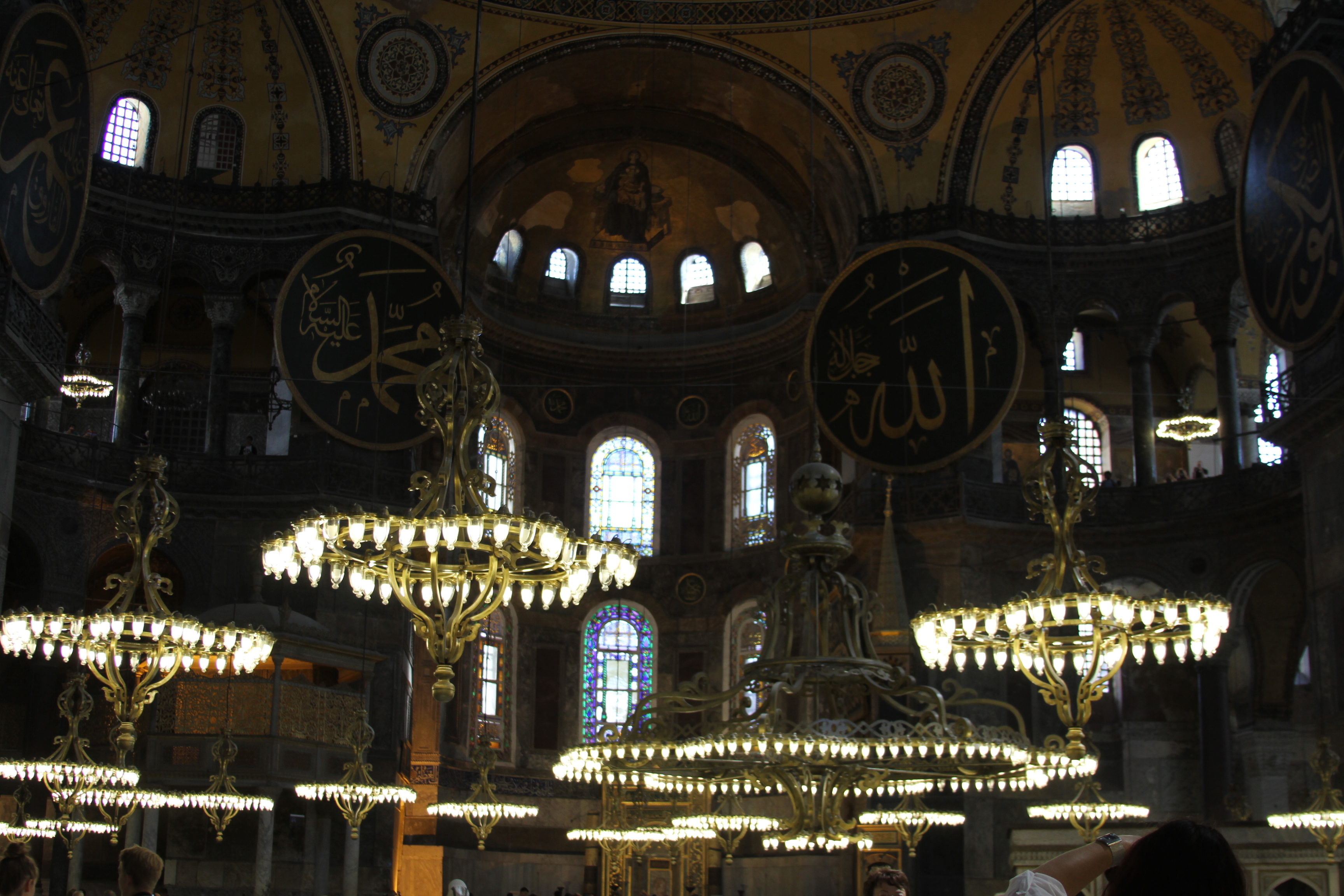 Interior de Hagia Sophia com os candelabros